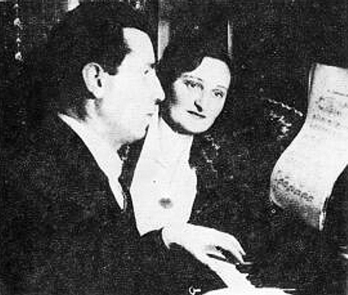 Foto de Vladimir Varankin kun la edzino Maria.